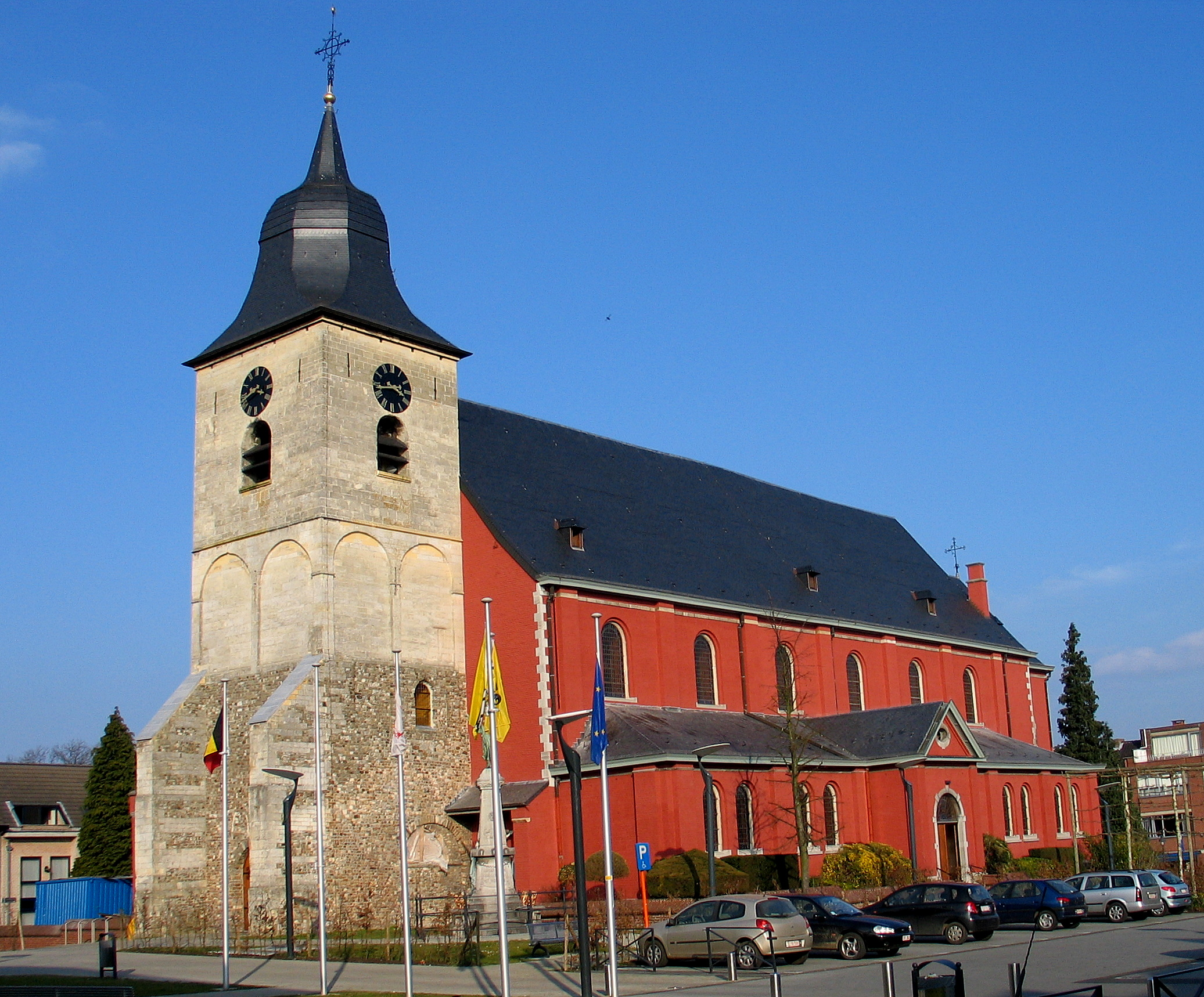 Sint-Stephanuskerk in Hoeselt, België